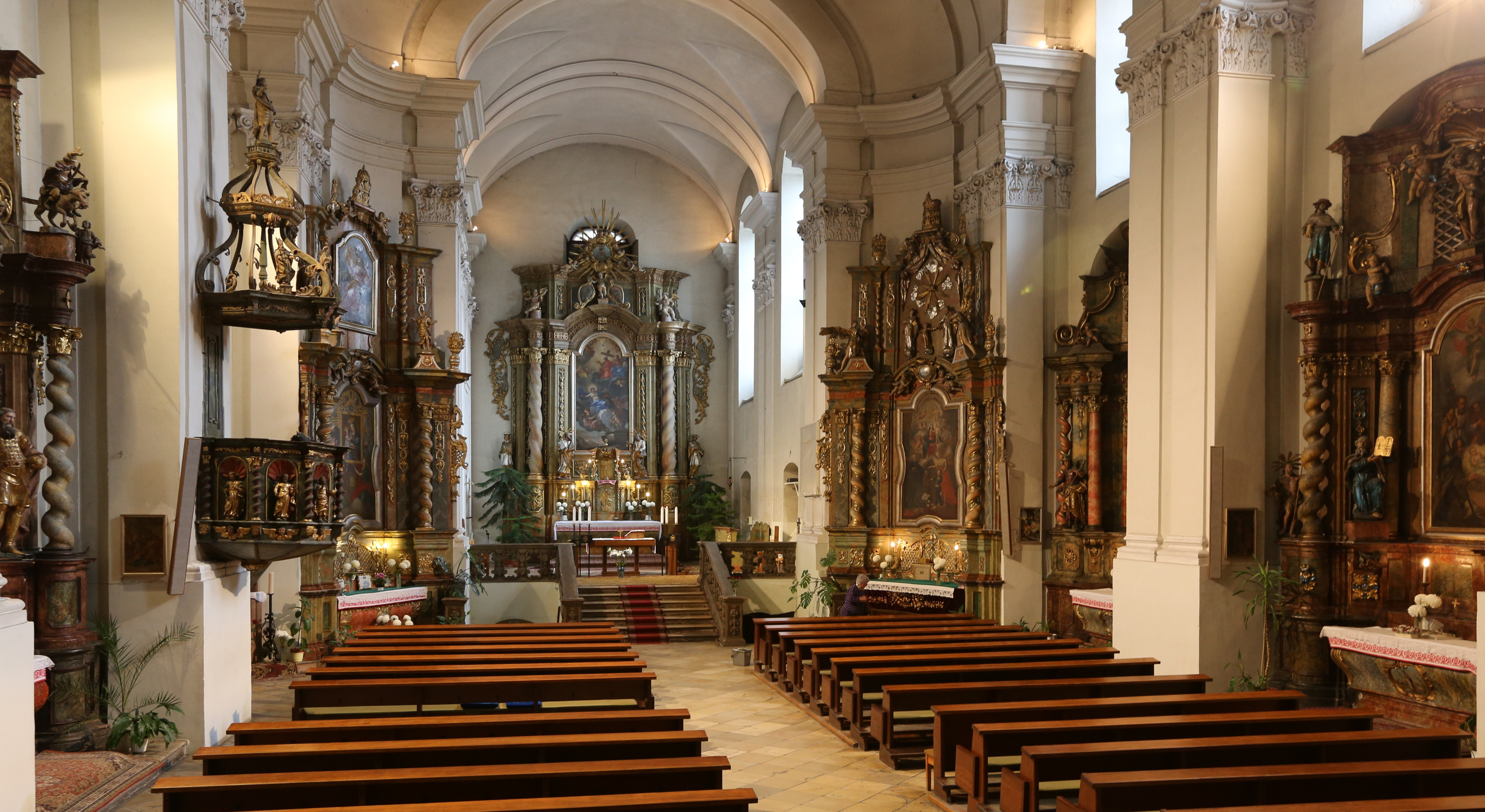 A piarista templom Kecskeméten.